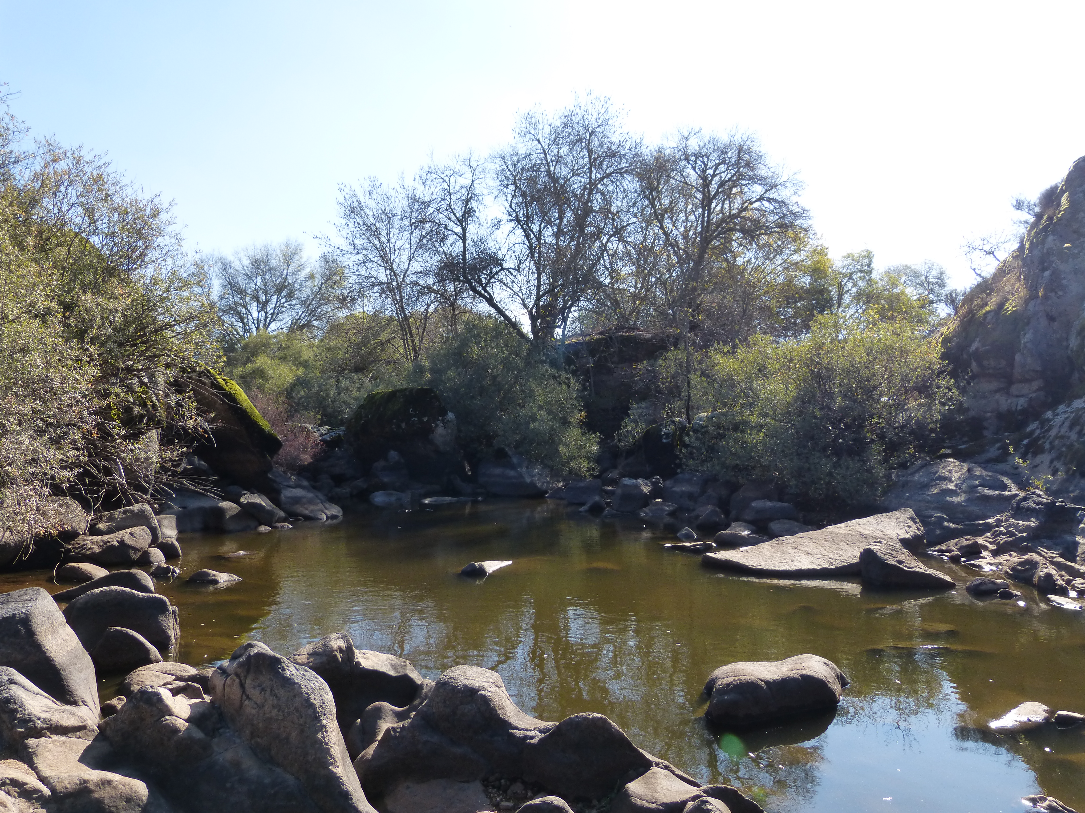 Riberas de los ríos Huebra, Yeltes, Uces y afluentes This is a photography of a Special Area of Conservation in Spain with the ID: ES4150064. Natura2000 entry, EEA entry